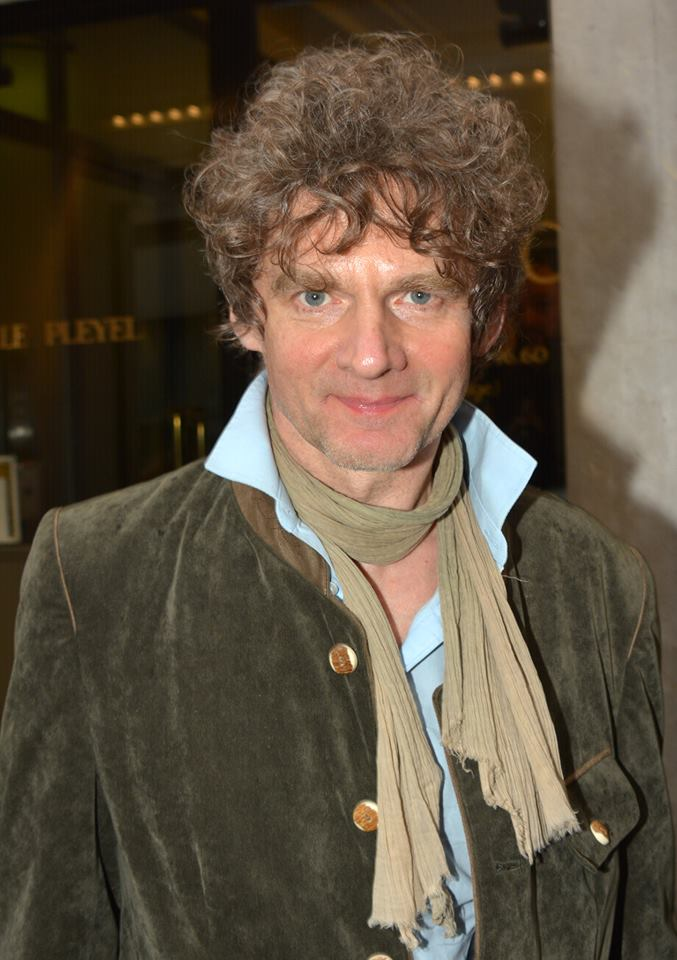 Nicolas Vaude à la cérémonie des Molières